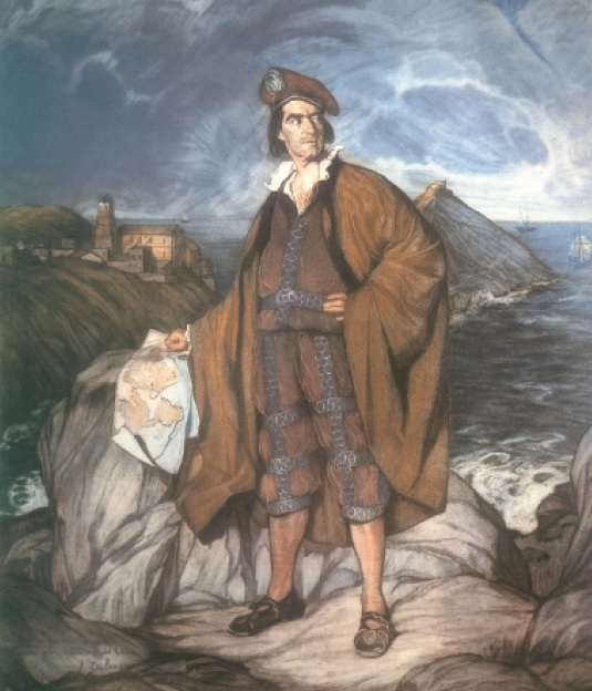 Juan Sebastian Elkano Ignacio Zuloagaren irudimenezko koadroa